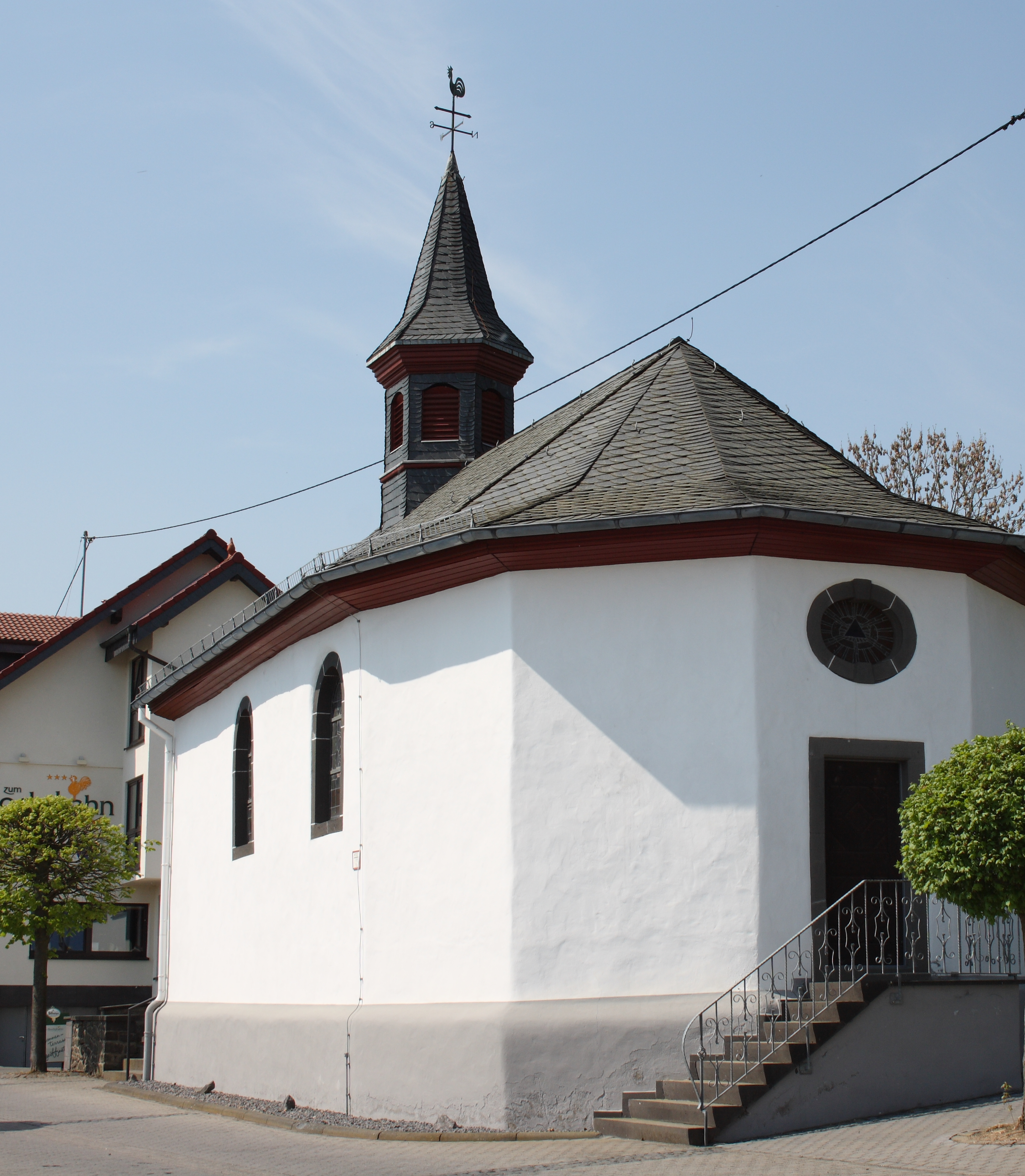 katholische Kreuzkapelle in Spessart